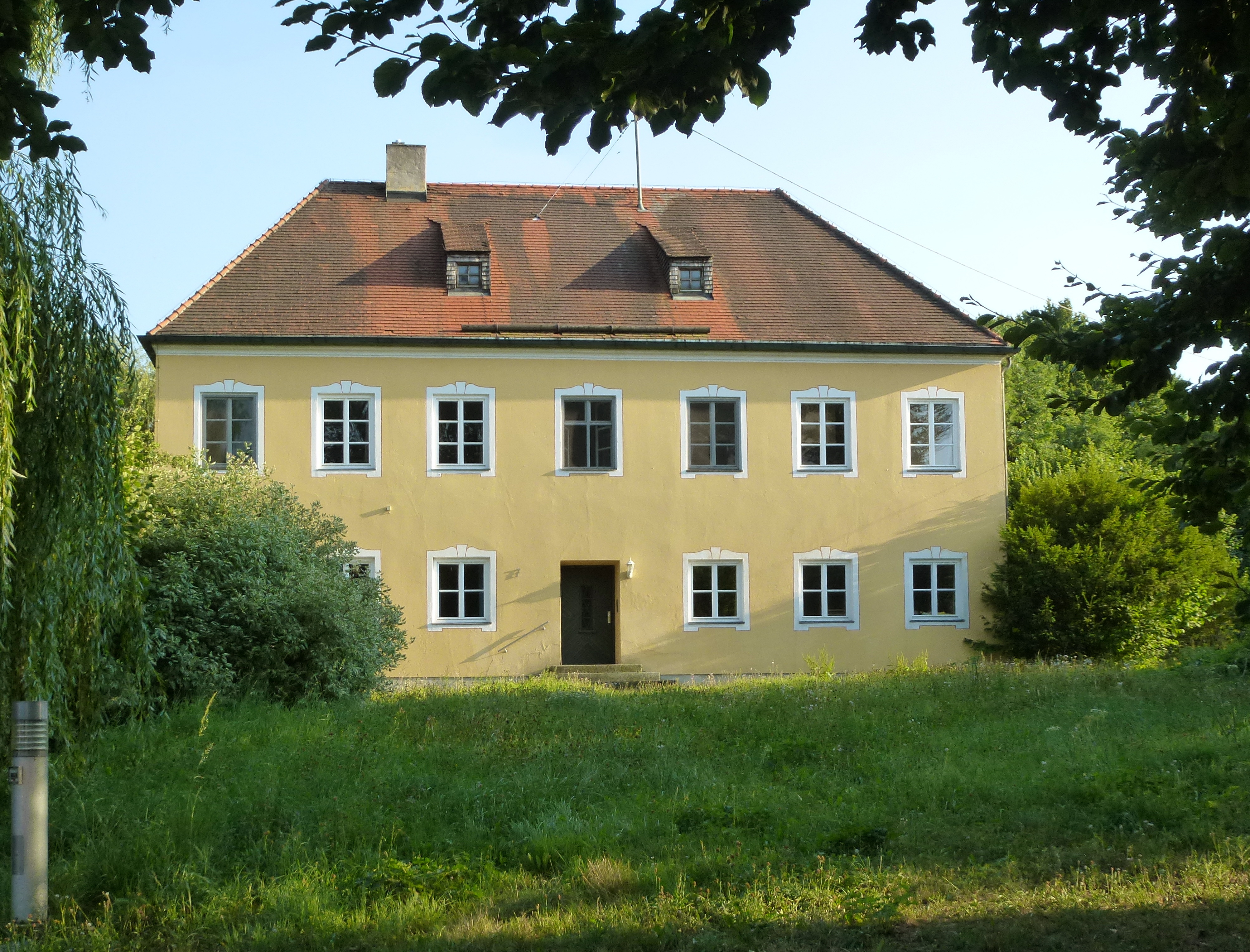 Pellheim, Dorfstr. 7: Pfarrhaus. Ansicht von S